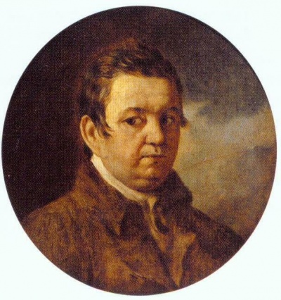 Автопортрет в пожилом возрасте